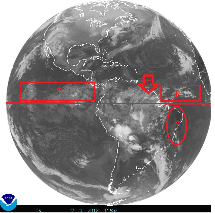 El ecuador terrestre y el ecuador térmico, con la banda nubosa en el segundo caso que suele identificarse como la Zona de Convergencia Intertropical